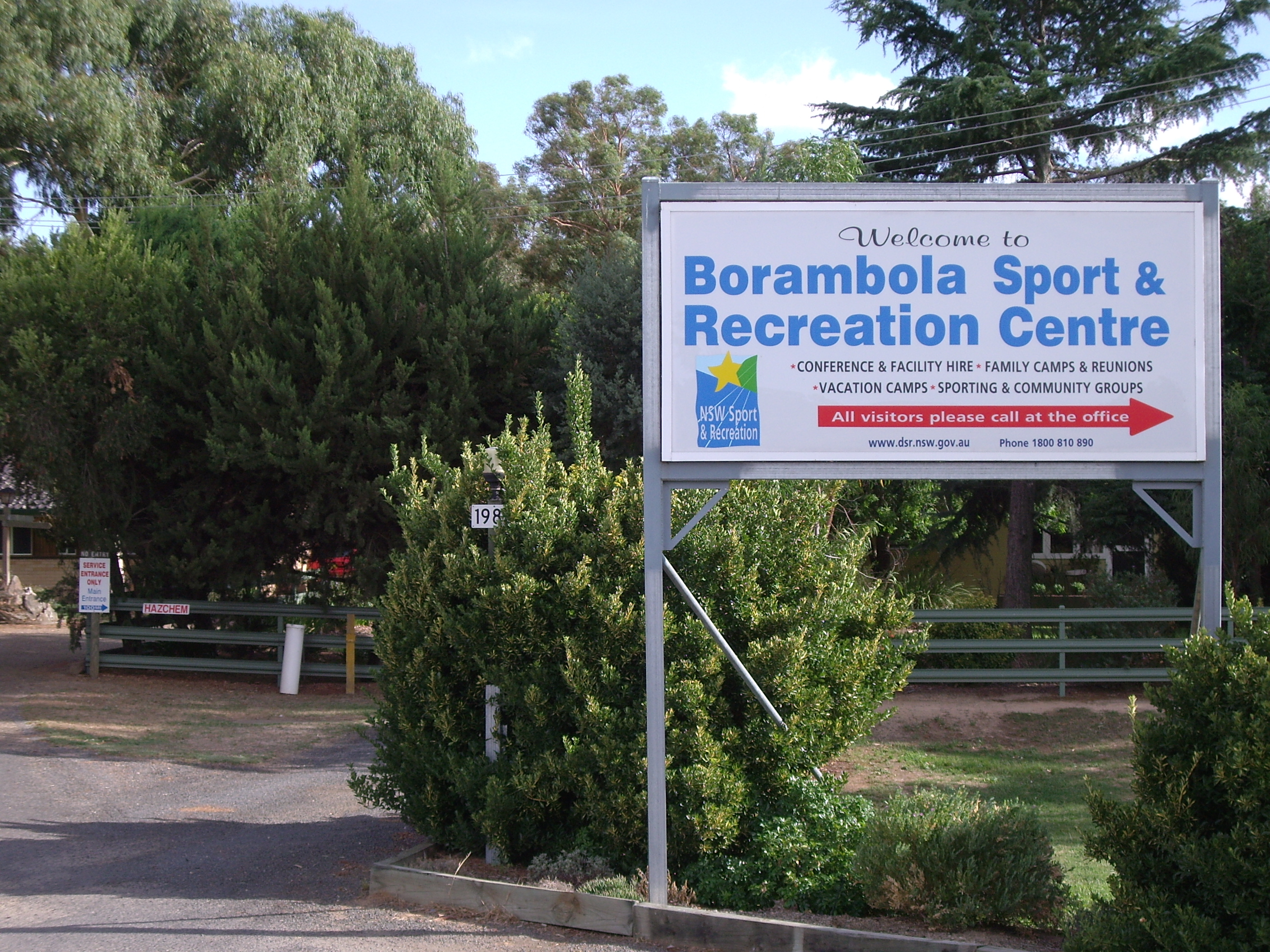 Borambola